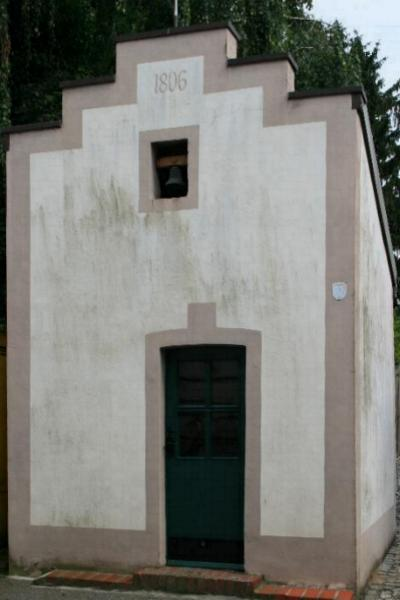 Kapelle in Wegberg-Kehrbusch